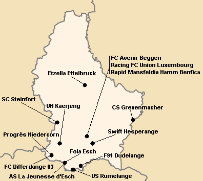 Répartition des clubs en Division Nationale 2008-2009.